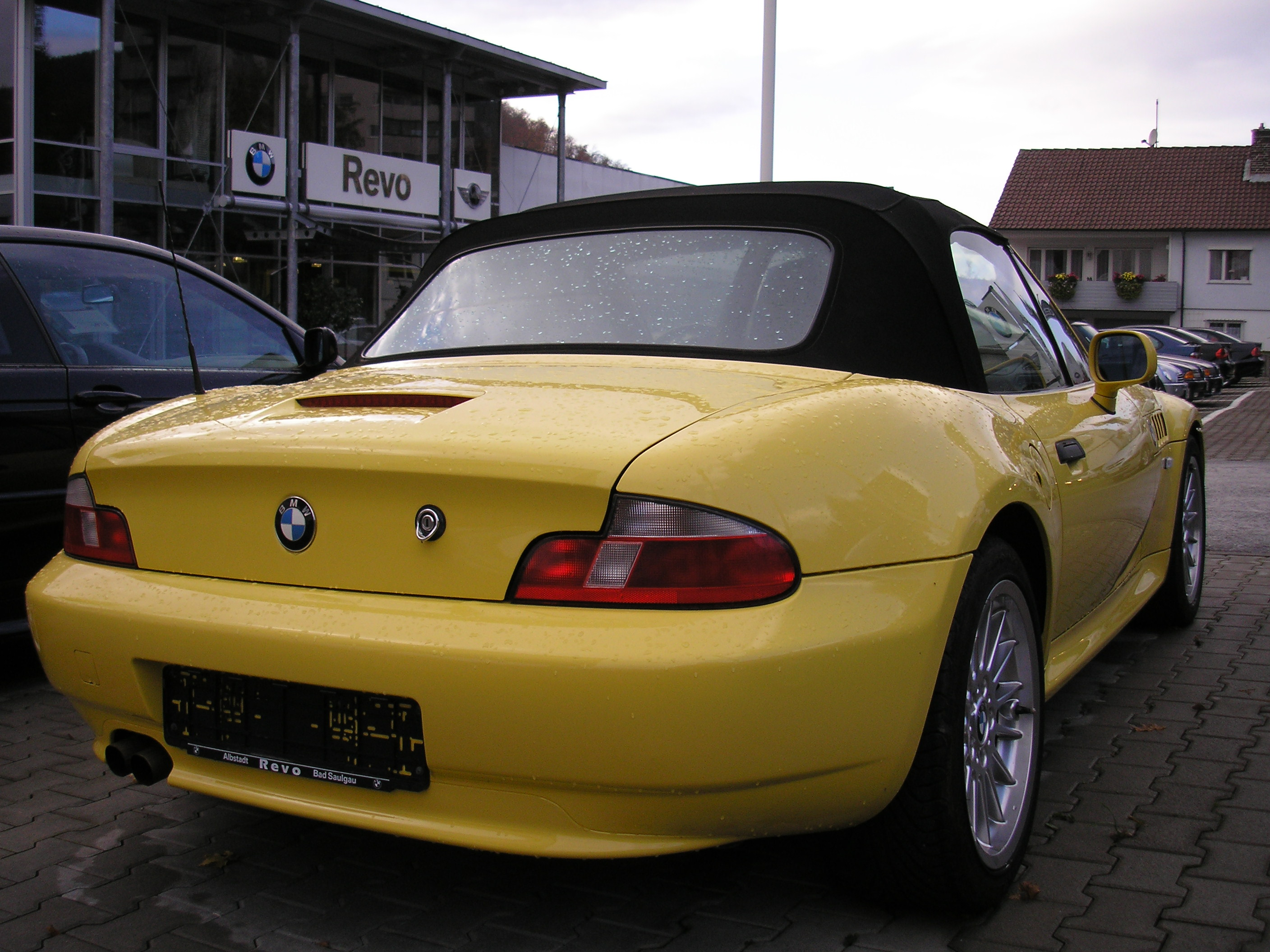 BMW Z3 Facelift Dakar Yellow